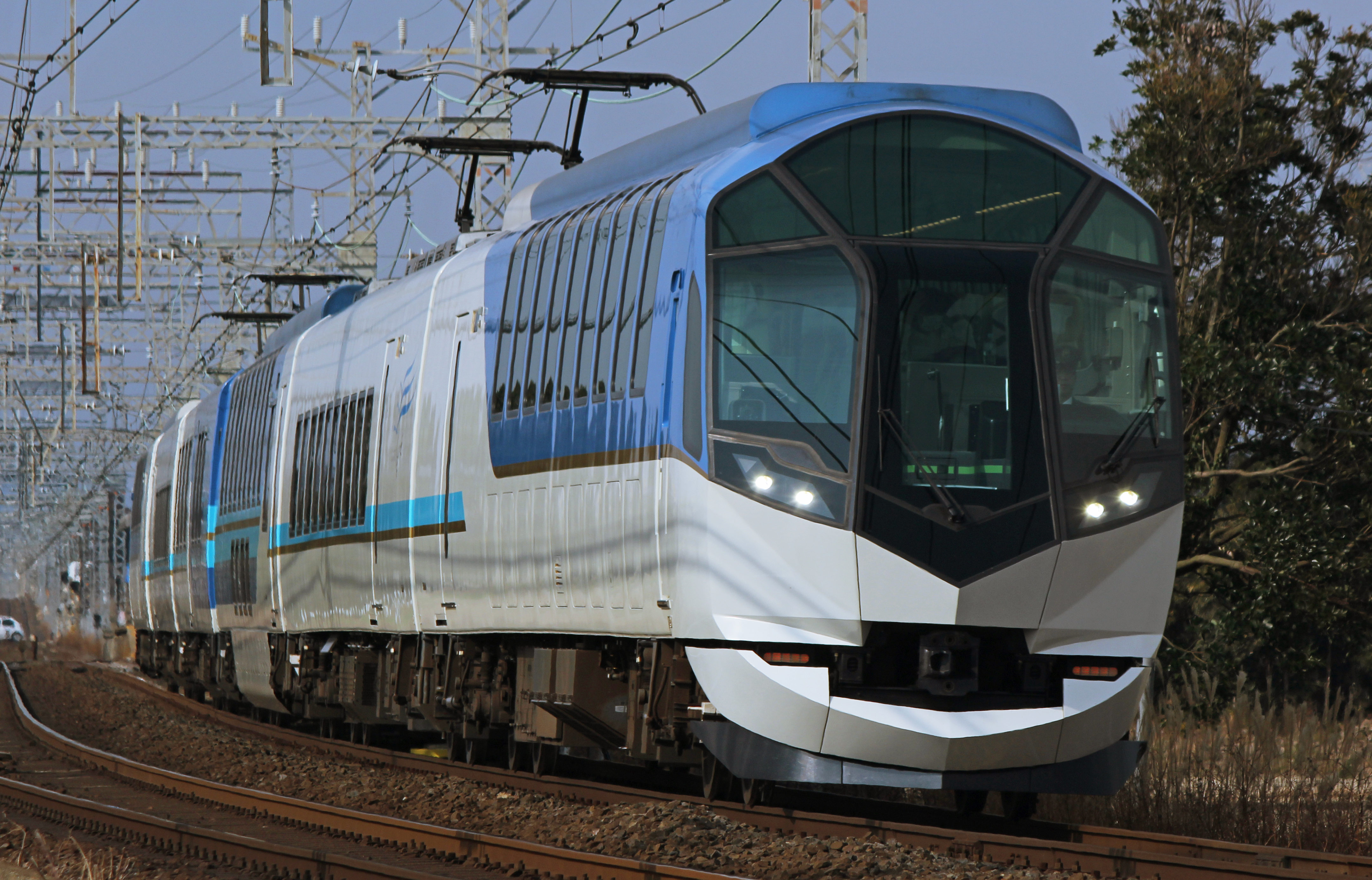 近鉄50000系電車 斎宮駅-漕代駅間